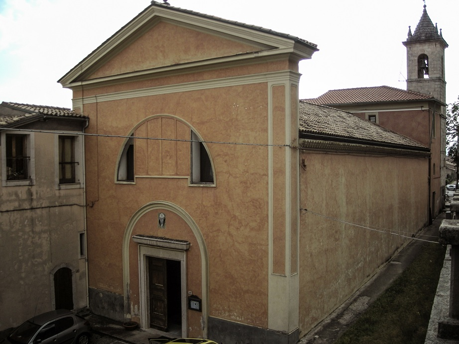 Il Convento dei Francescani